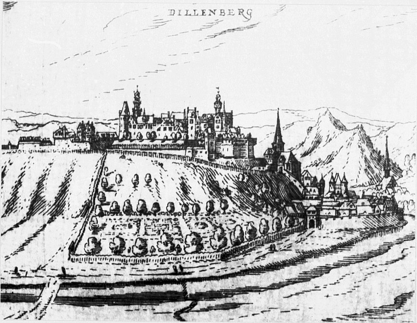 Artist Wilhelm Dilich Alternative namesDilich-Schäffer, Wilhelm Scheffer, SchöfferDescription German copperplate engraver Date of birth/death15714. April 1655Location of birth/deathDresdenAuthority control VIAF: 32799261 GND: 119100754 BnF: cb14537952m ISNI: 0000 0001 2127 0331 WP-Person TitleDILLENBERGDescription Ansicht von Dillenburg Date1605Mediumcopper engravingCurrent locationMurhardsche Bibliothek der Stadt Kassel und LandesbibliothekNotesHessische Chronika Wilhelm DilichSource/PhotographerBildarchiv Foto Marburg: [1] Ansicht von Dillenburg